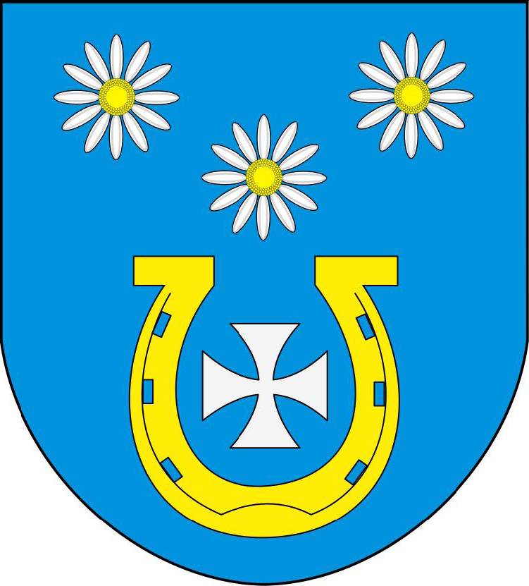 Herb gminy Siemiątkowo.